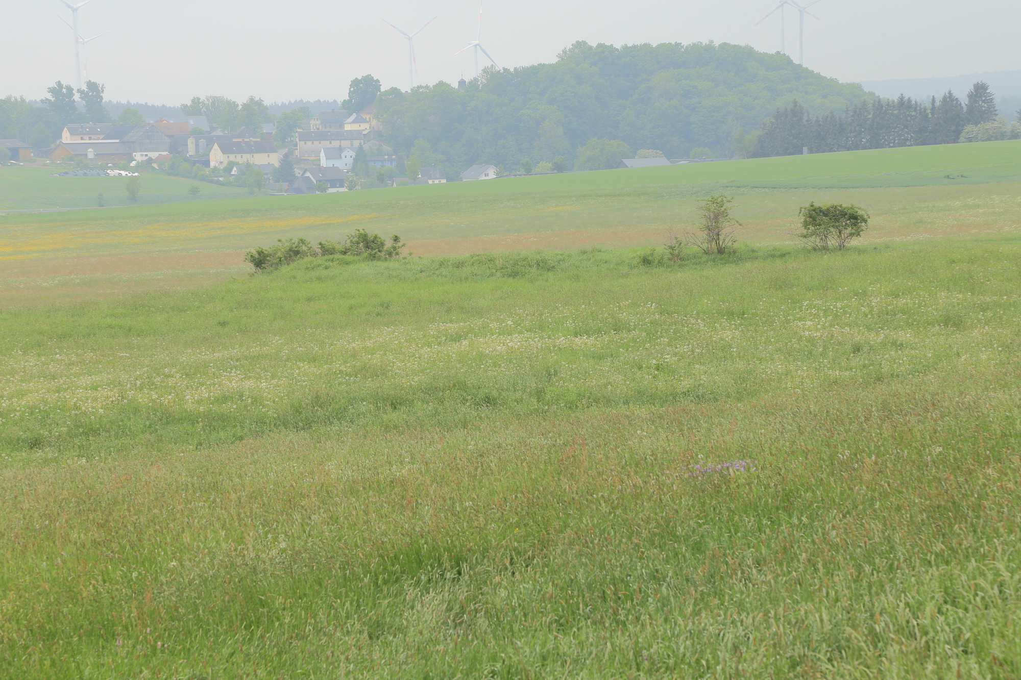 Geotop Nr.: 475A024 Landkreis Hof/Bayerisches Vogtland